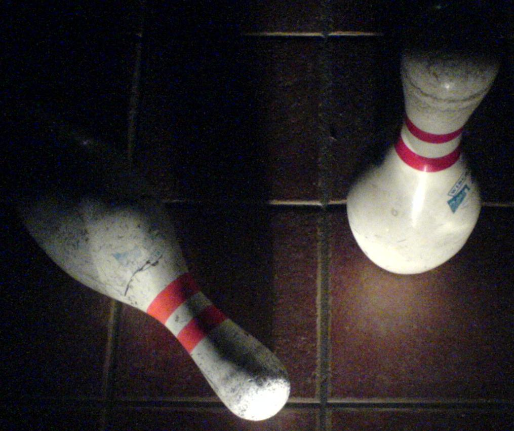 Two bowling pins; Två bowlingkäglor